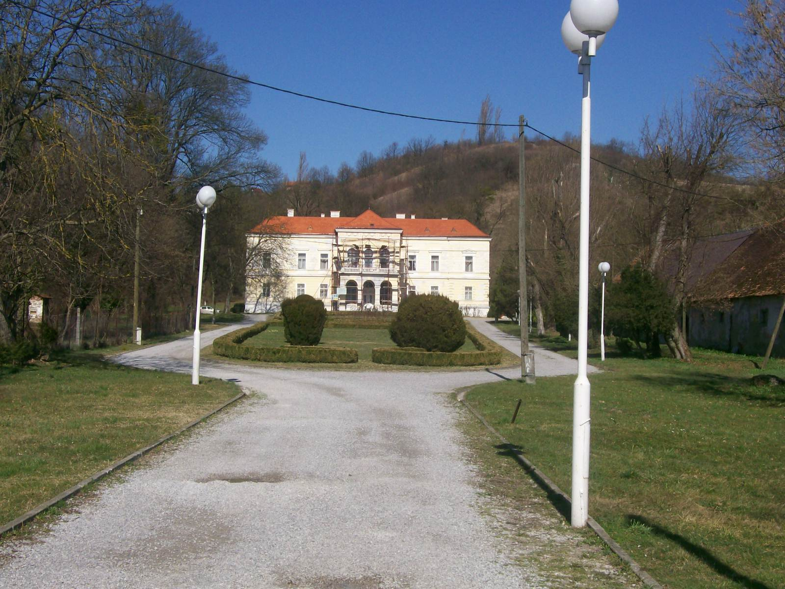 Dvorac Laduč kraj Zaprešića (općina Brdovec)